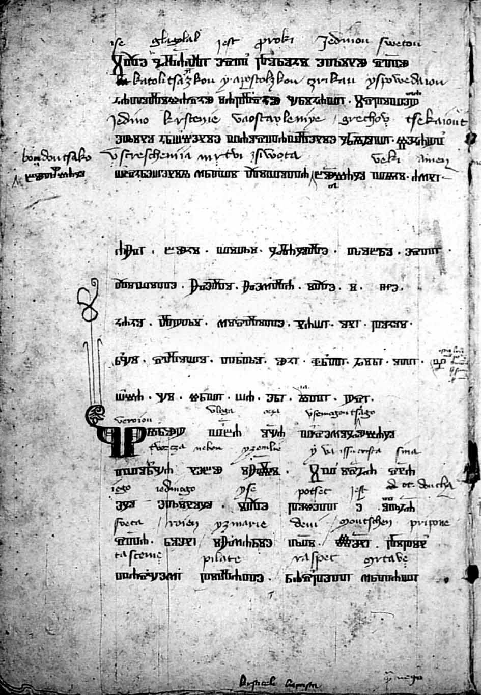 rukopis Jurja Slovinca